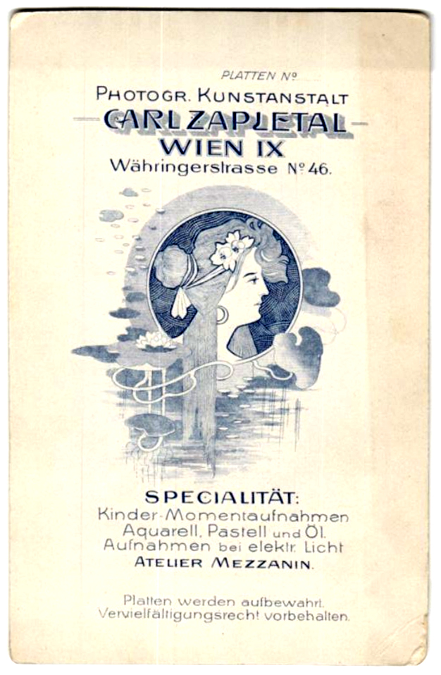 Revers einer Kabinettfotografie mit einem bläulichen Vordruck im Jugendstil und dem Text „Platten No. Photogr. Kunstanstalt - Carl Zapletal - Wien IX Währingerstrasse No. 46. (Frauenkopf zwischen Blatt- und Rankenornamenten) Specialität: Kinder Momentaufnahmen Aquarell, Pastell und Öl Aufnahmen bei elektr. Licht Atelier Mezzanin. Platten werden aufbewahrt. Vervielfältigungsrecht vorbehalten“ ...